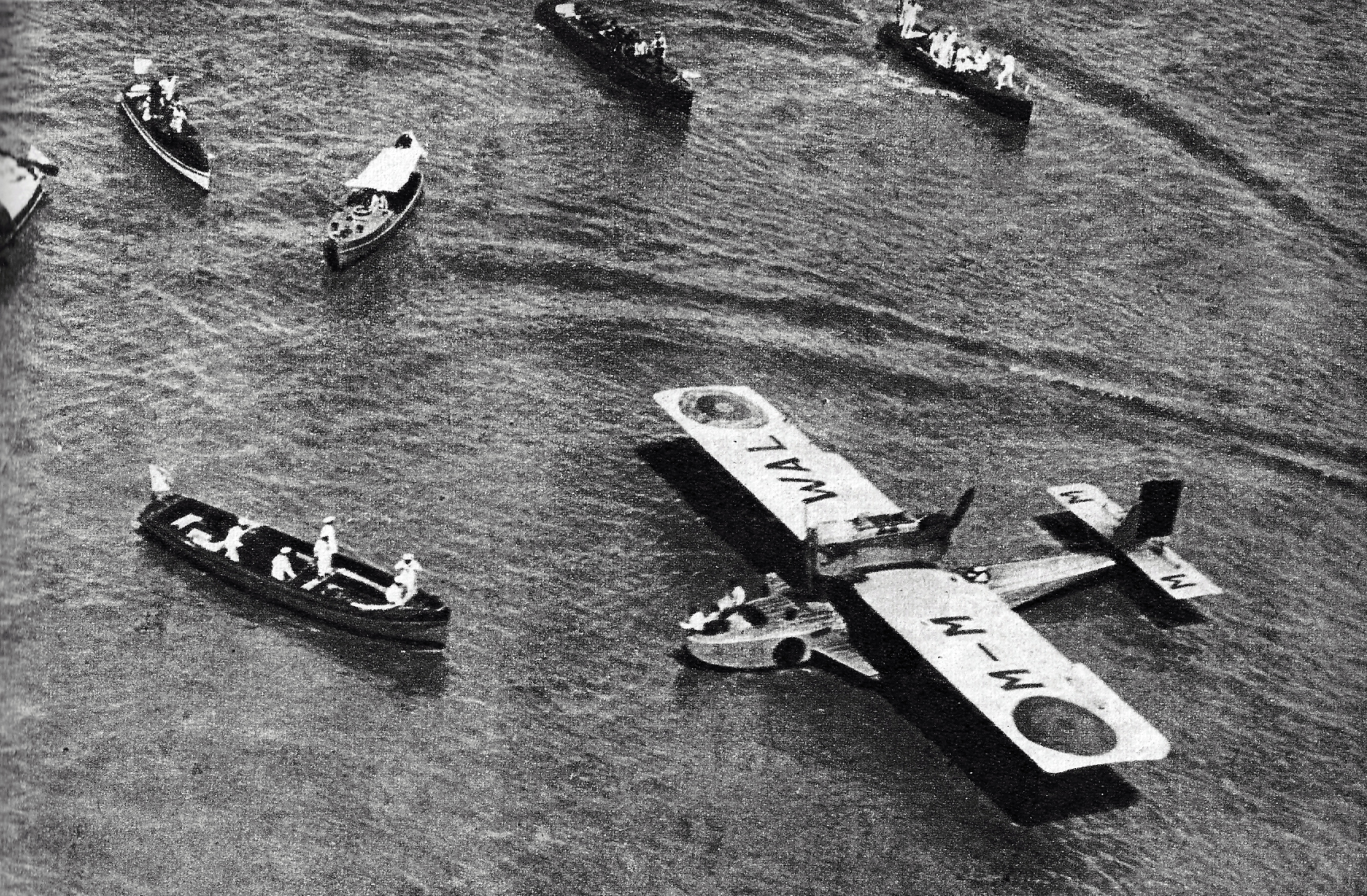 Acuatizaje del Plus Ultra en el Río de la Plata, Buenos Aires, Argentina, 1926)